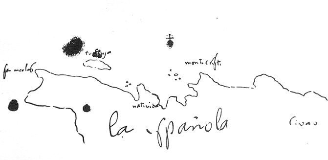 Mapa de La Española realizado por Colón donde se puede ver señalado el fuerte de Natividad y el territorio de Civao, que a Colón le sonó similar a Cipango, que era el nombre que tenía Japón entonces para los exploradores